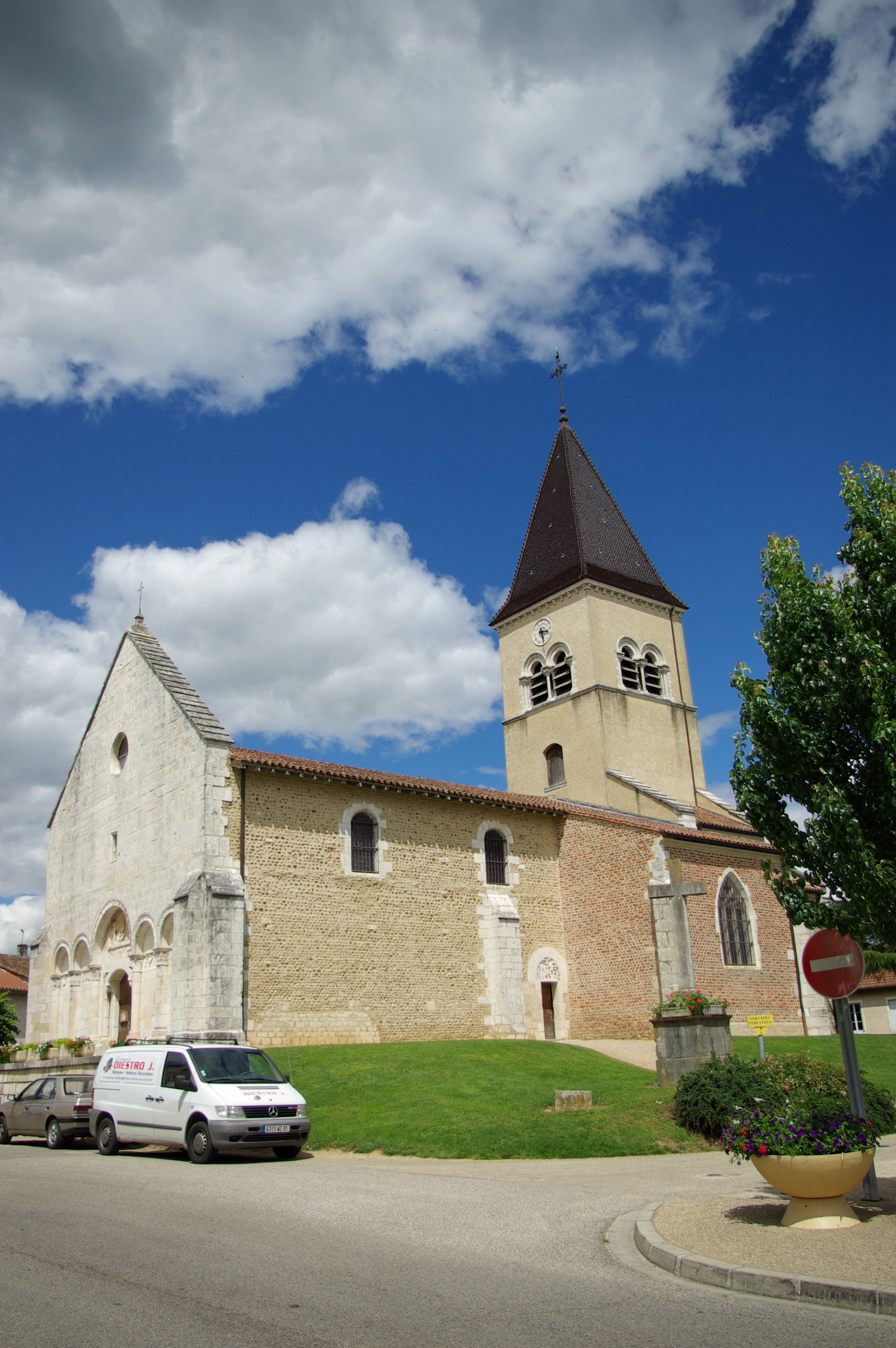 Eglise de Saint-Paul-de-Varax, Ain, France